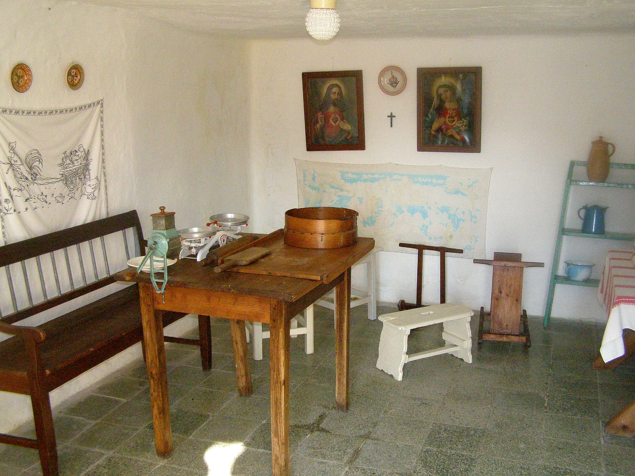 Skalné obydlia v Brhlovciach; ukážka vybavenia interiéru usadlosti